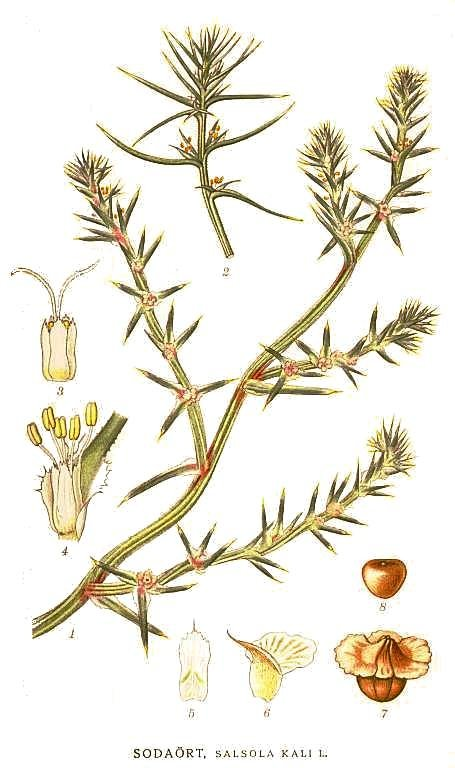 Kali turgida (Dumort.) Guterm., (Syn. Salsola kali L.) Original Description Sodaört, Salsola kali L.